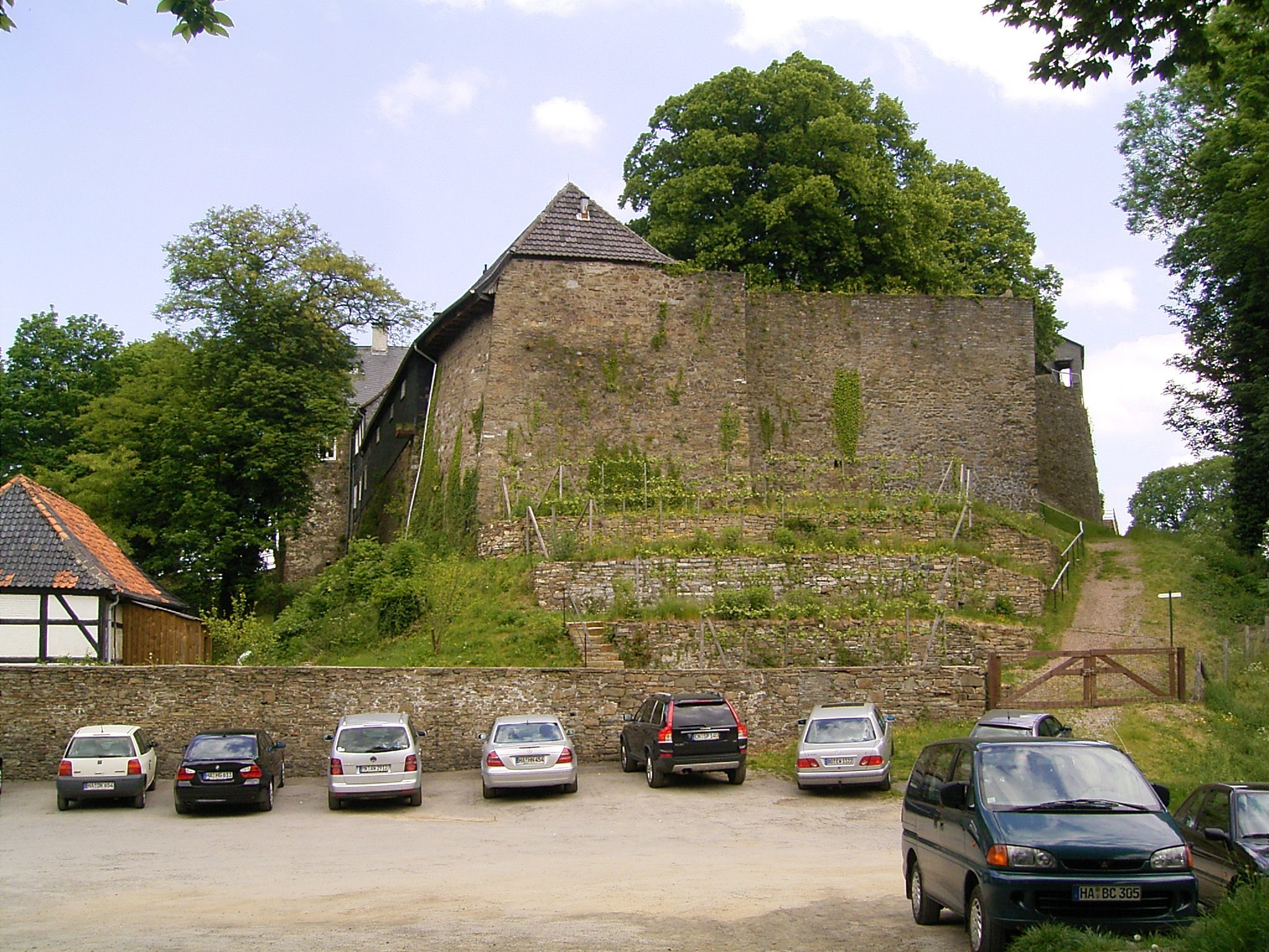 Schloss Hohenlimburg in Hagen-Hohenlimburg mit nach historischem Vorbild 2005 vom Bürgerverein Wesselbach neuangelegten „Weinberg“ (Weinterrassen mit ca. 50 Rebstöcken, Rotweinsorte Regent)